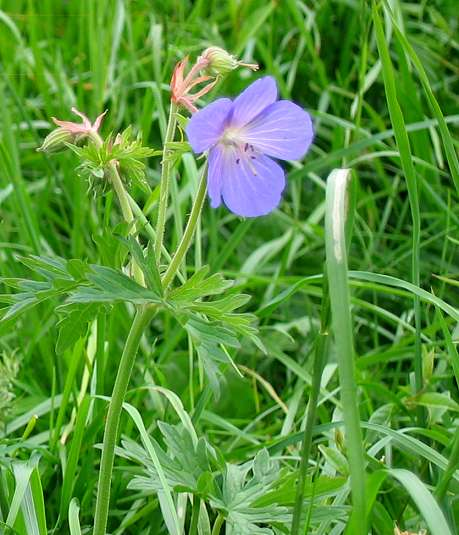 Geranium pratense